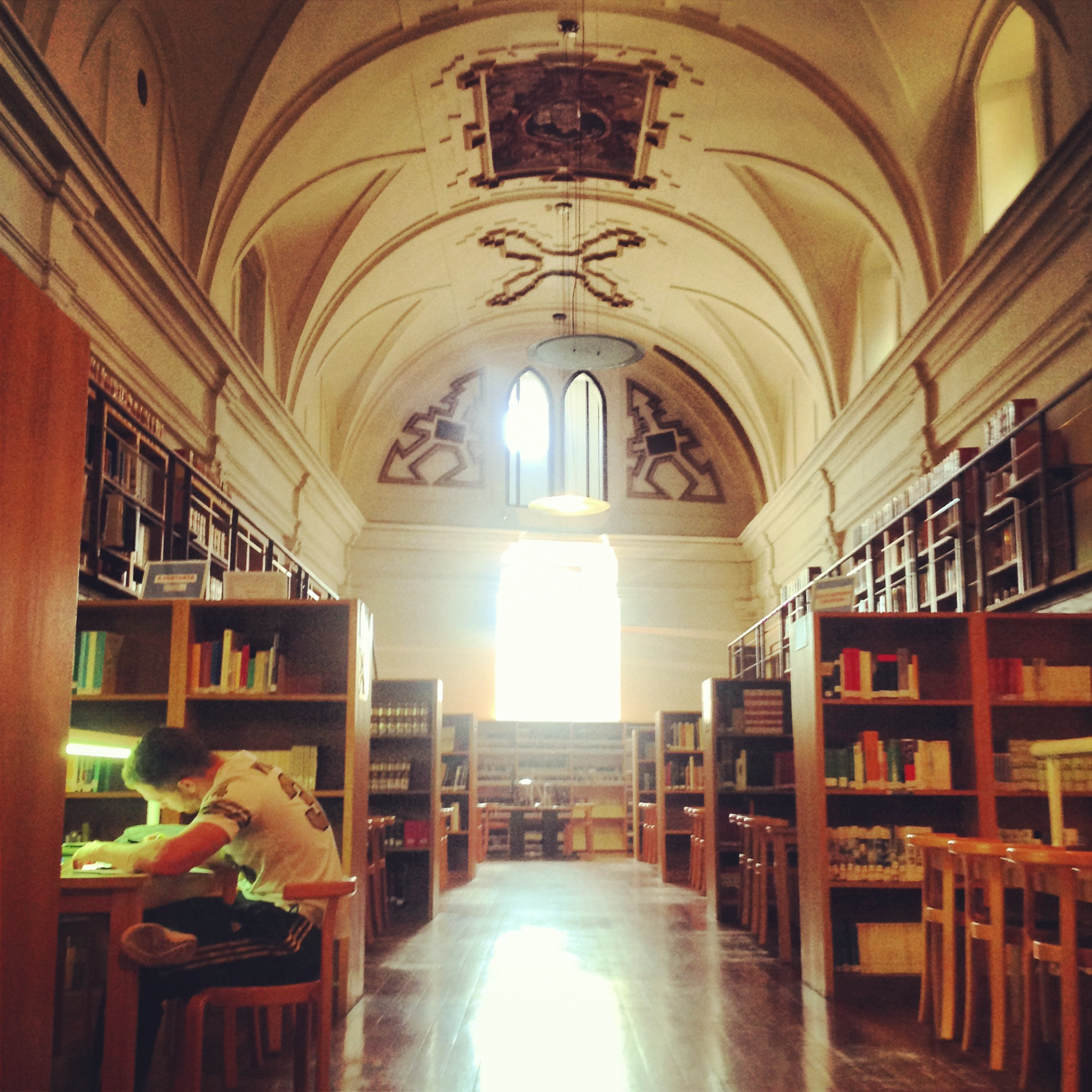 Biblioteca General del Campus de Toledo. Claustro de San Pedro Mártir. Refectorio